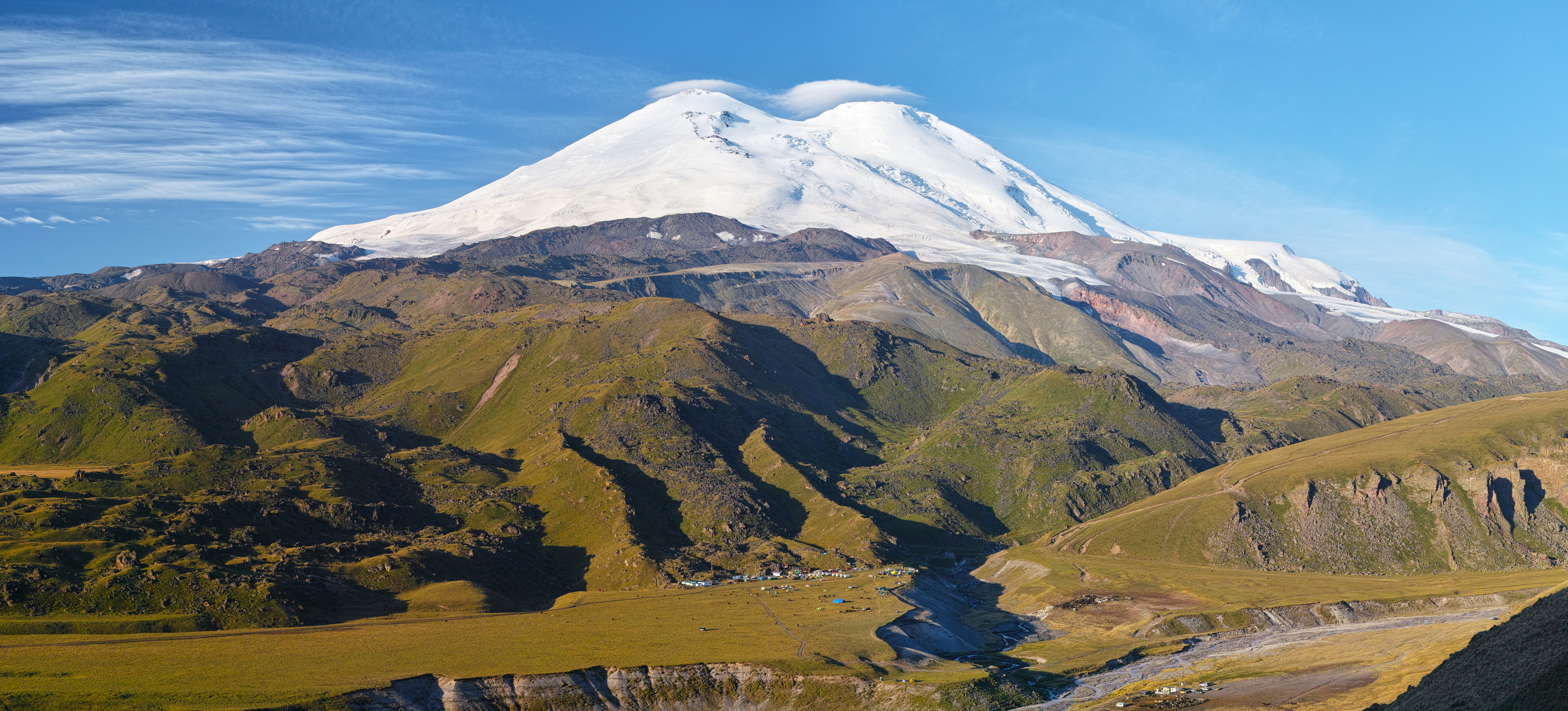 Вид на Эльбрус с севера